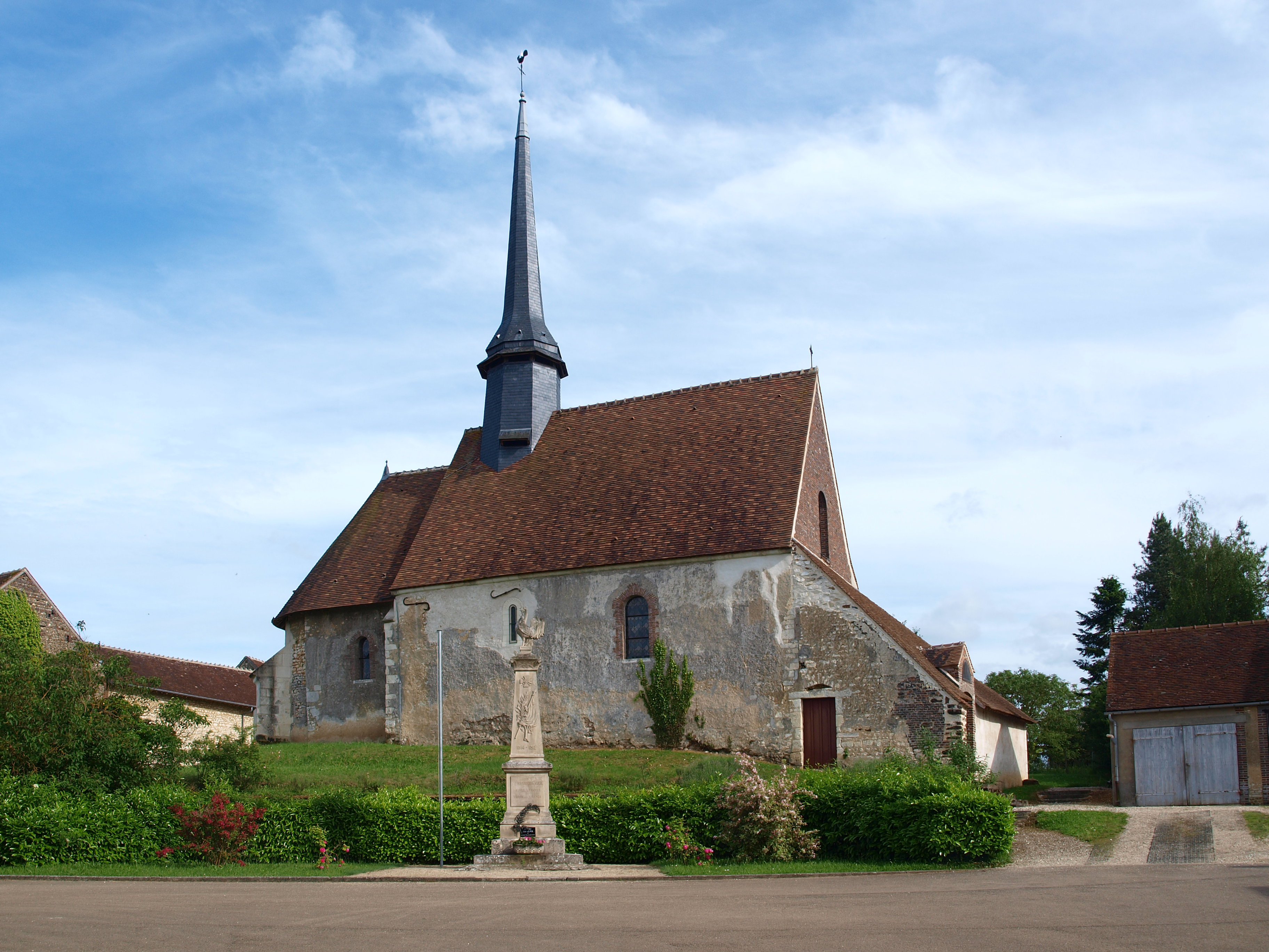 Saint-Maurice-le-Vieil (Yonne, France), église & monument aux morts.